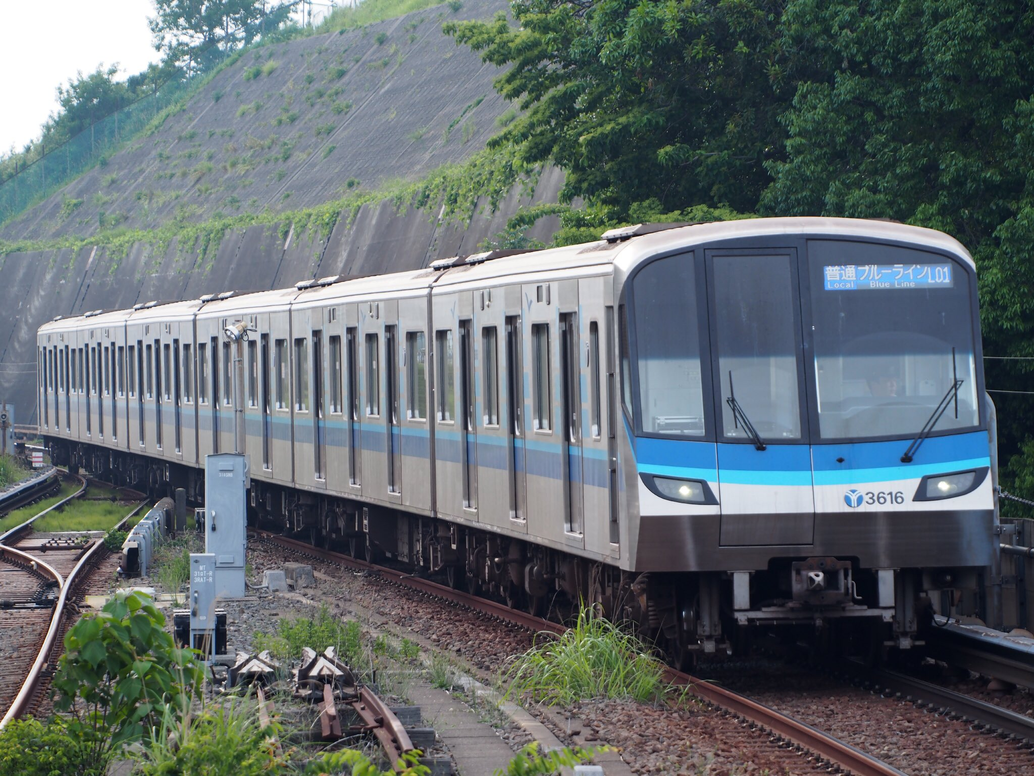 横浜市営地下鉄ブルーライン上永谷駅